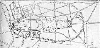 Plan des Volksparks Jungfernheide Charlottenburg